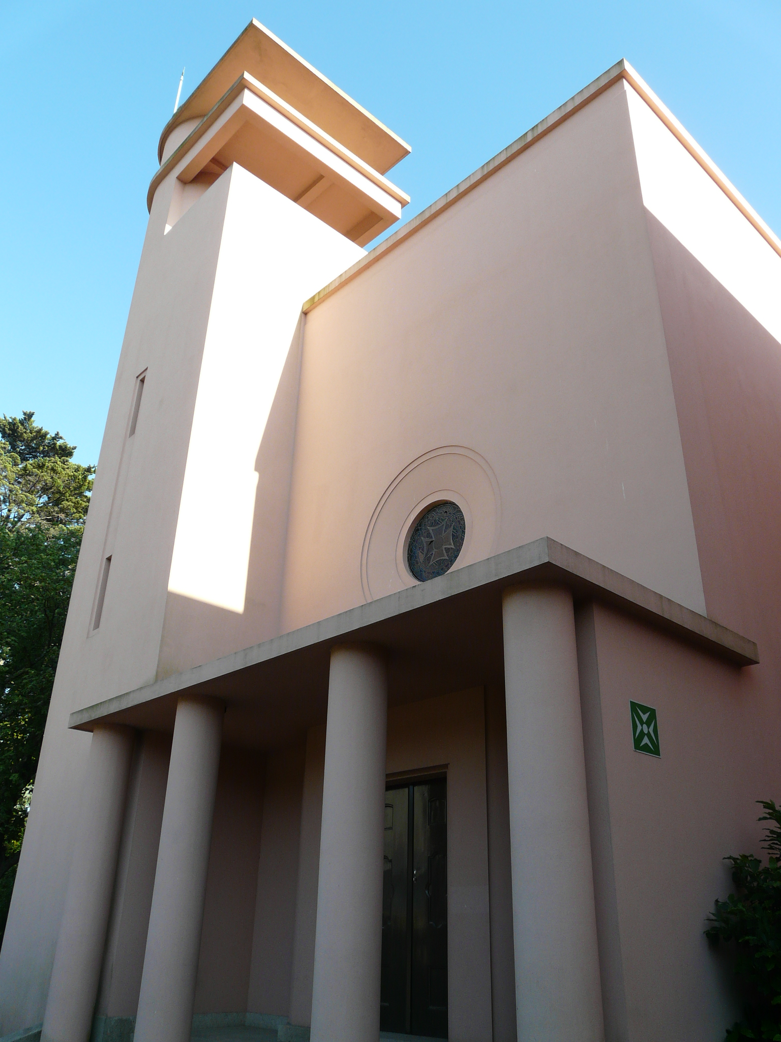 Art Deco chapel at Casa de Serralves